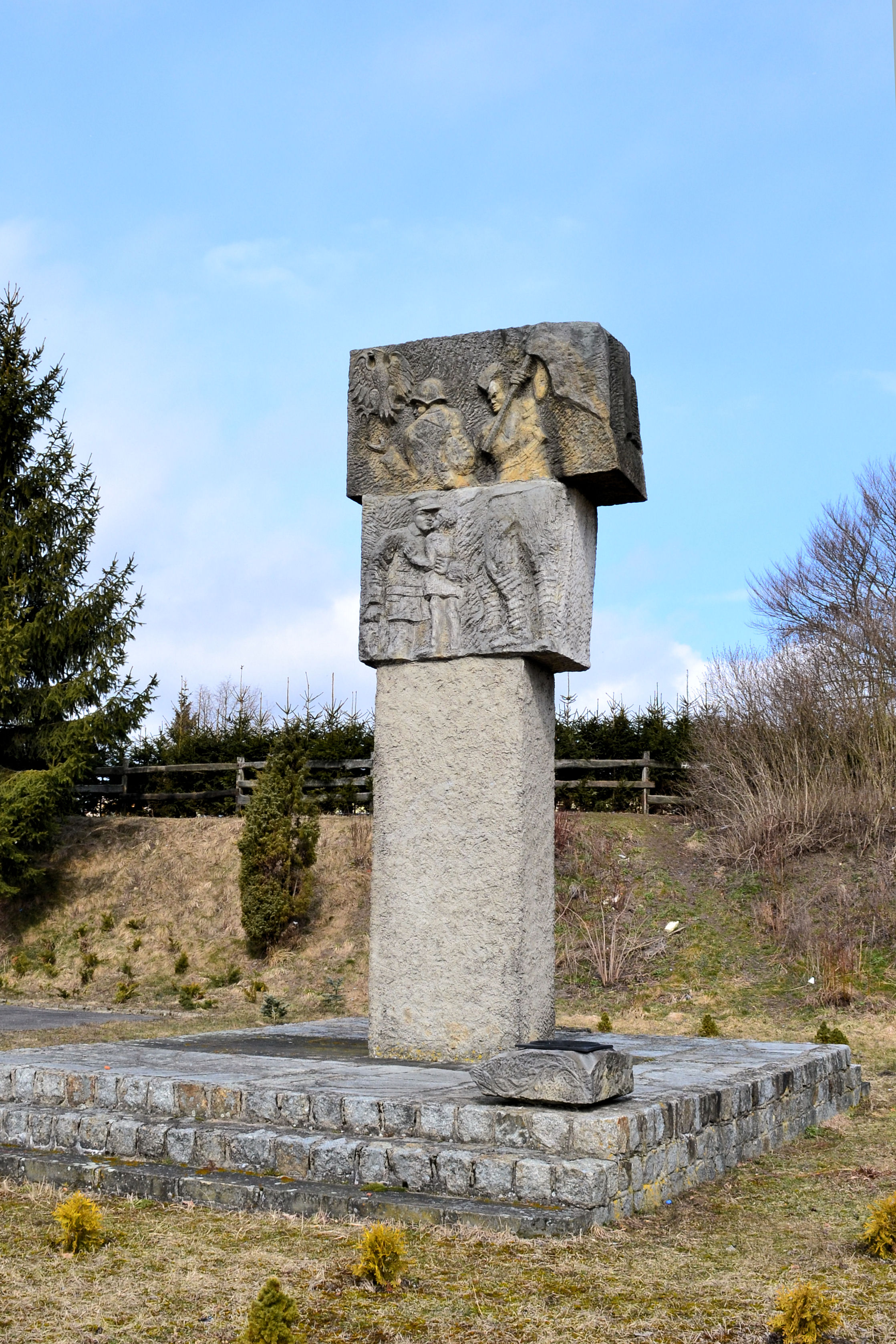 Kalisz Pomorski